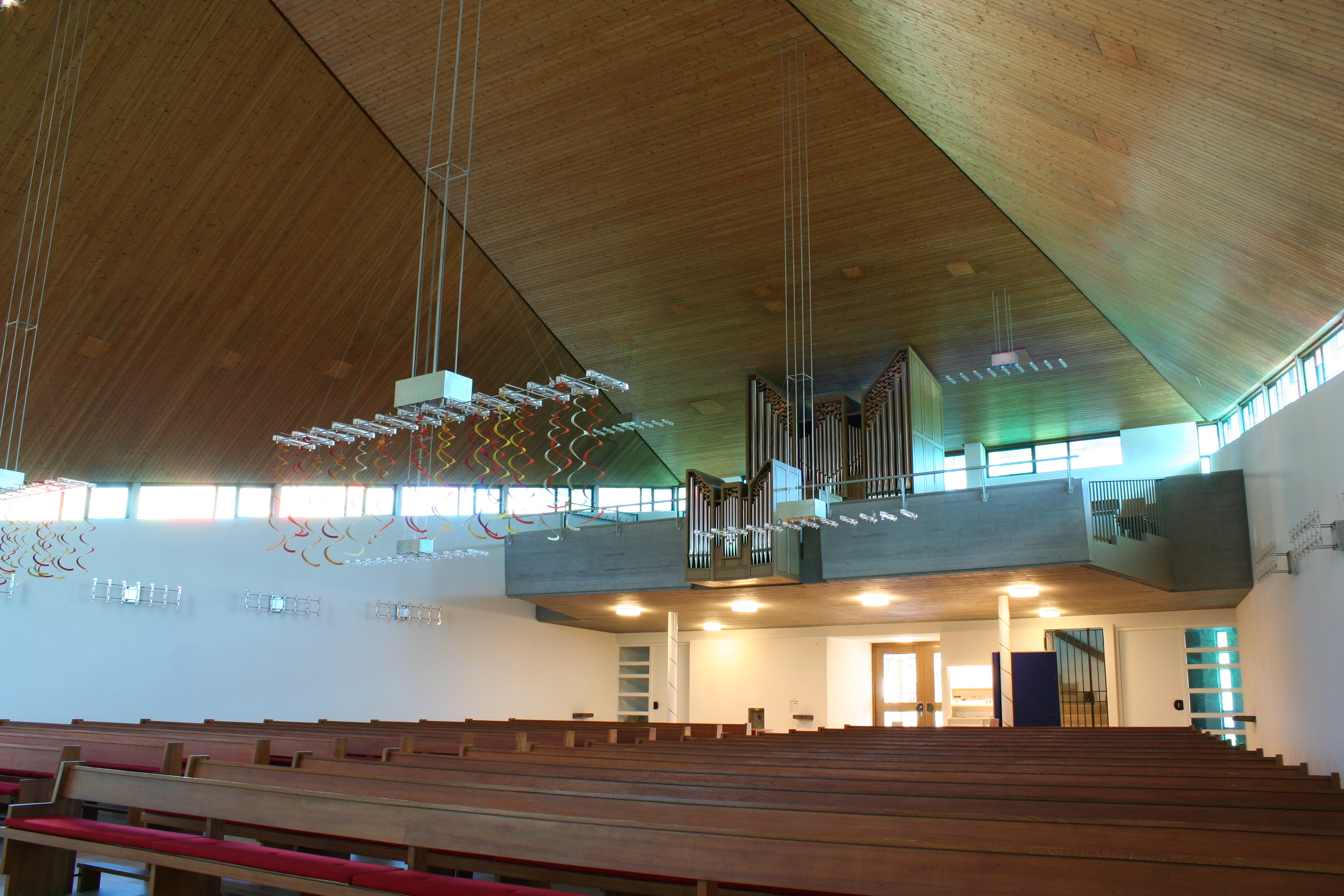 Römisch-katholische Pfarrkirche St. Benignus Pfäffikon ZH, Orgelempore